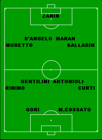 formazione titolare del chievo nella partita carrarese chievo 93-94